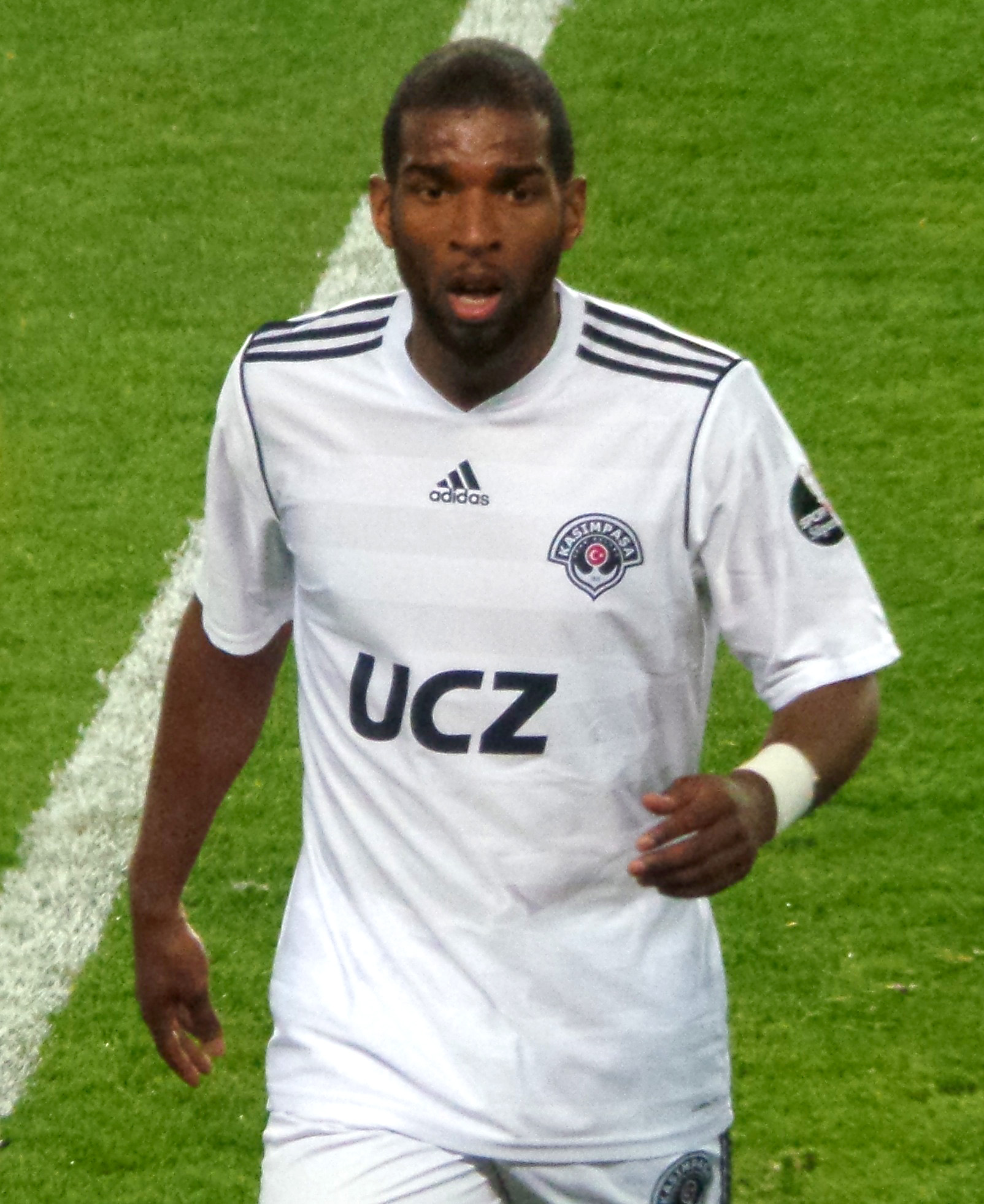 Ryan Babel FB match